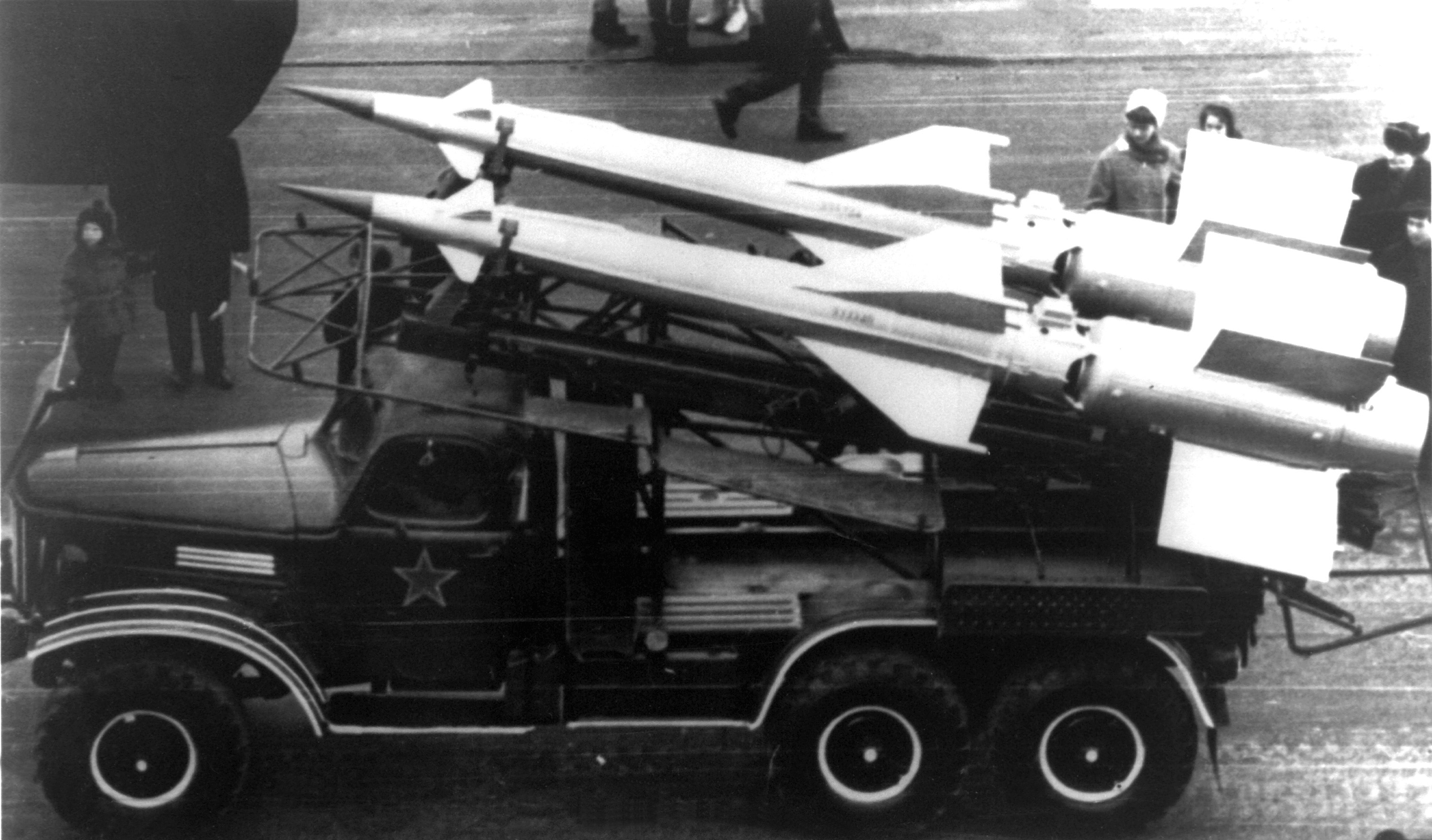 A U.S. military photo taken from "Information presented on this WWW site is considered public information and may be distributed or copied. Use of appropriate byline/photo/image credits is requested."